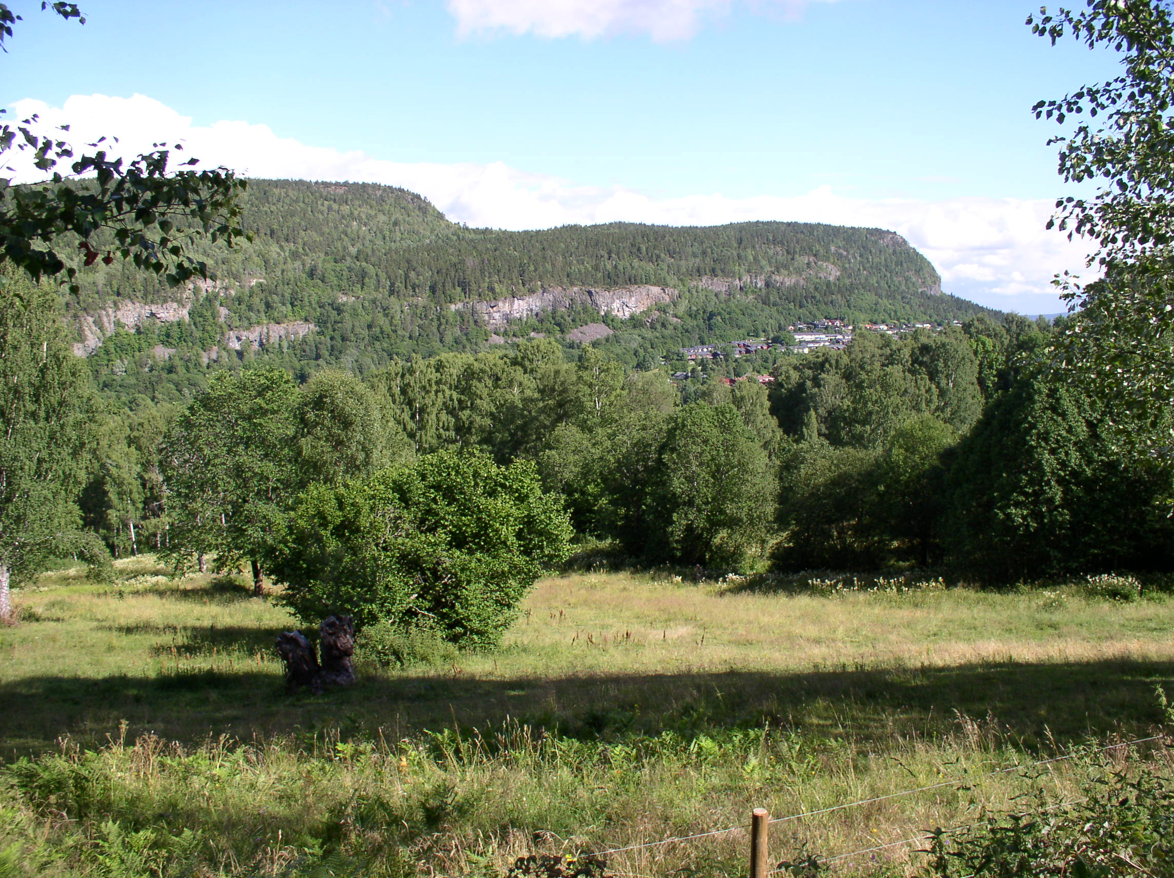 Kolsåstoppene Sør og Nord sett fra Ankerveien i vest.